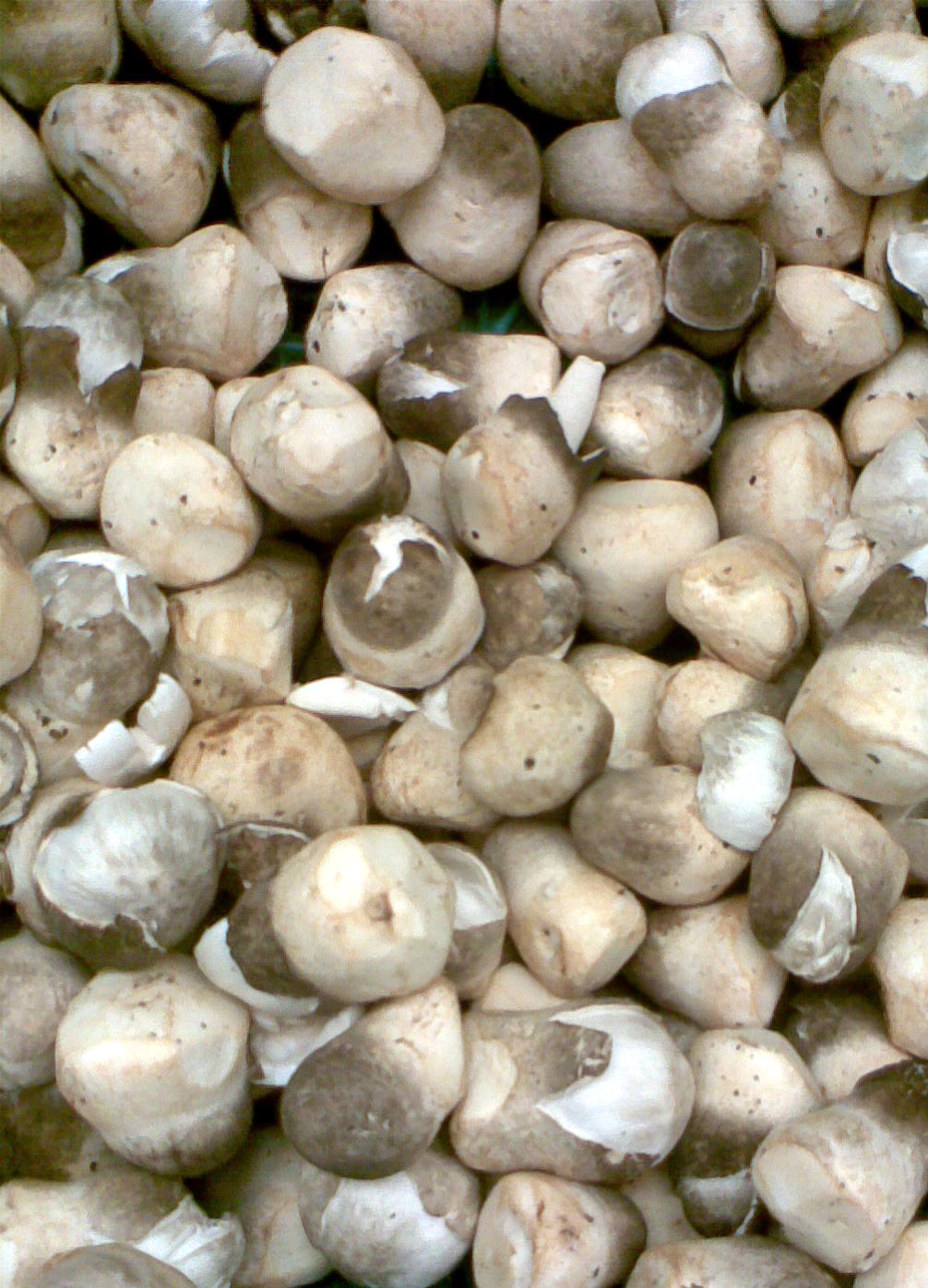 草菇